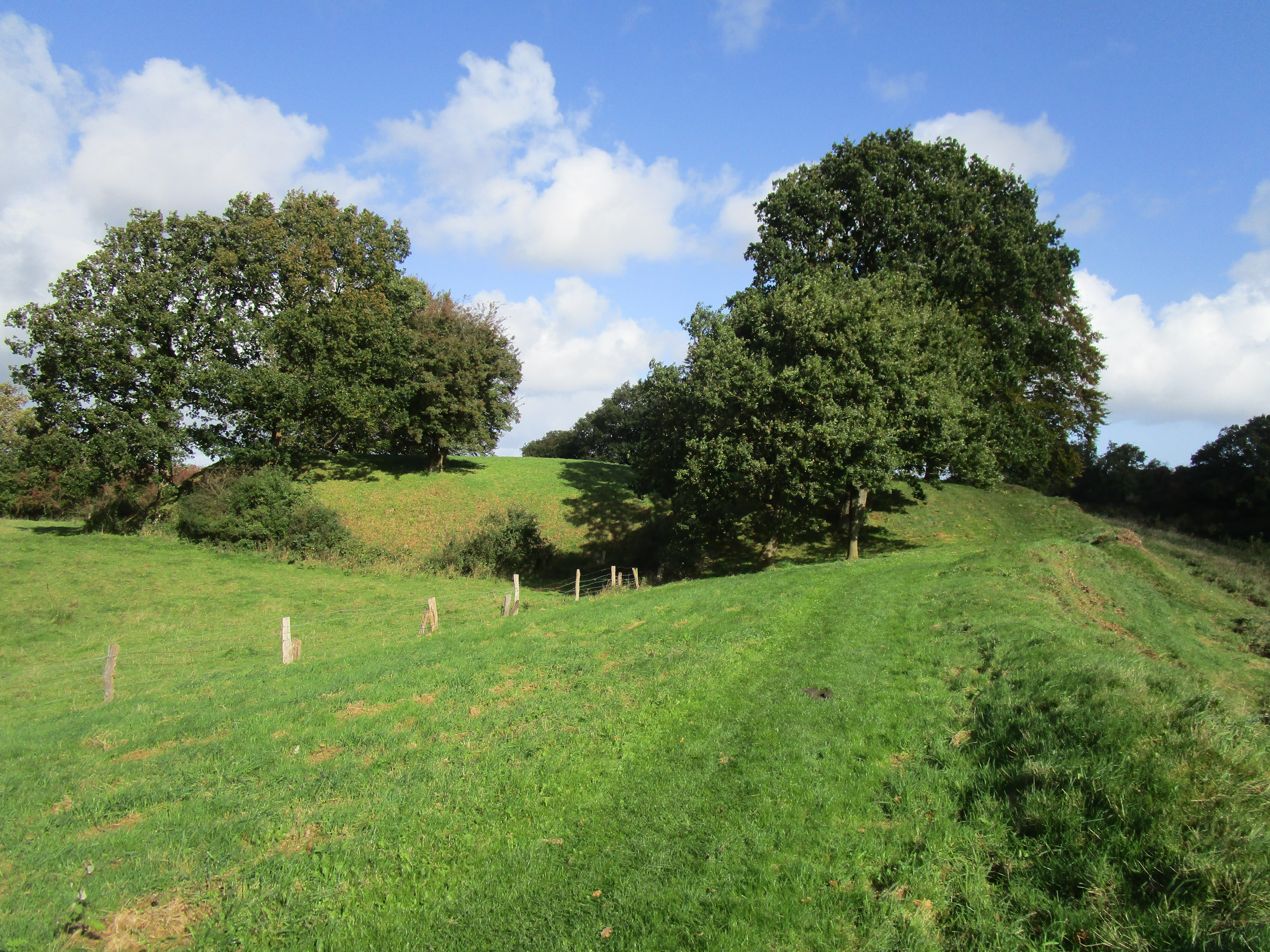 Thyraborg, set fra vest (Hovedvolden)